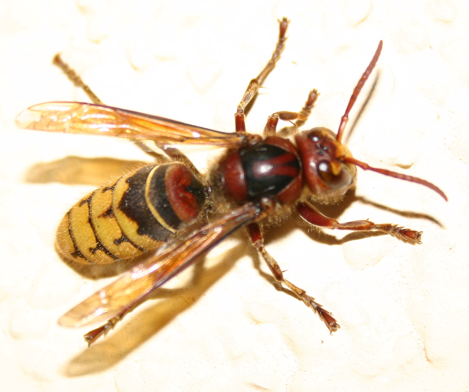 Hornisse (Vespa crabro), angelockt durch künstliches Licht. Die Hornisse ist die größte in Mitteleuropa lebende soziale Faltenwespe. Die Körpergröße der Königin beträgt bis zu 35 Millimeter, die der Arbeiterinnen 18 bis 25 Millimeter und die der Drohne 21 bis 28 Millimeter. Sie bildet einjährige Staaten.